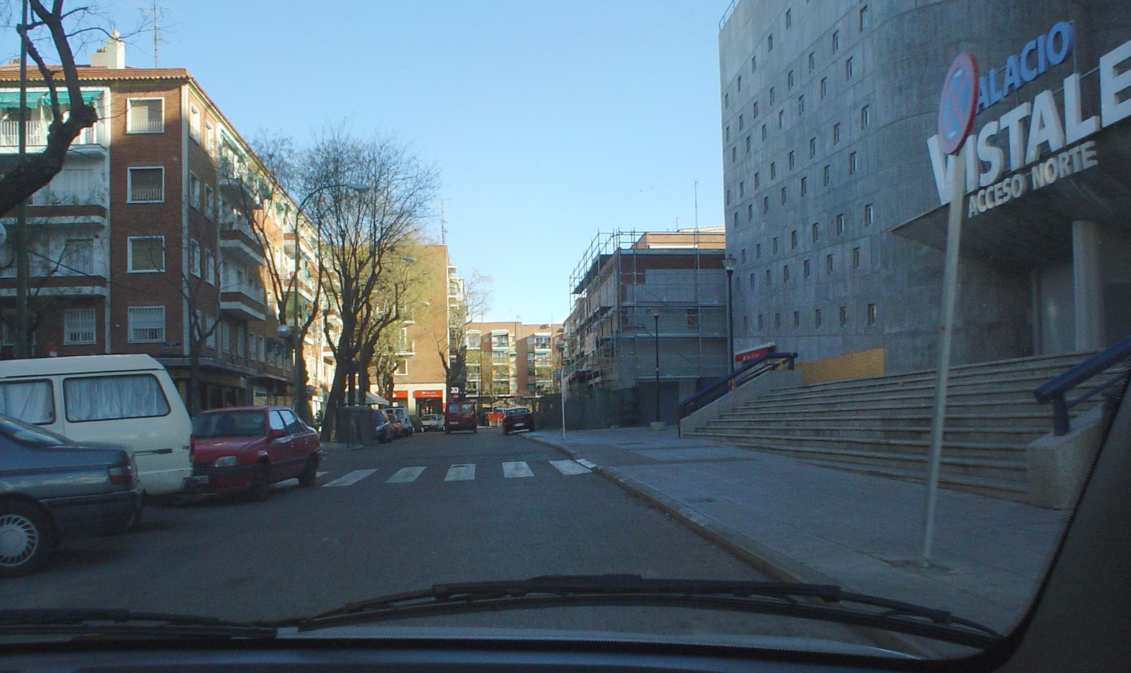 Palacio de Vista Alegre, Carabanchel. Picture taken by me of Vista Alegre stadium, Carabanchel Bajo, Madrid.